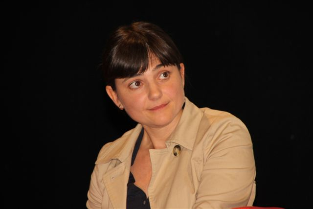 L'europarlamentare italiana Debora Serracchiani